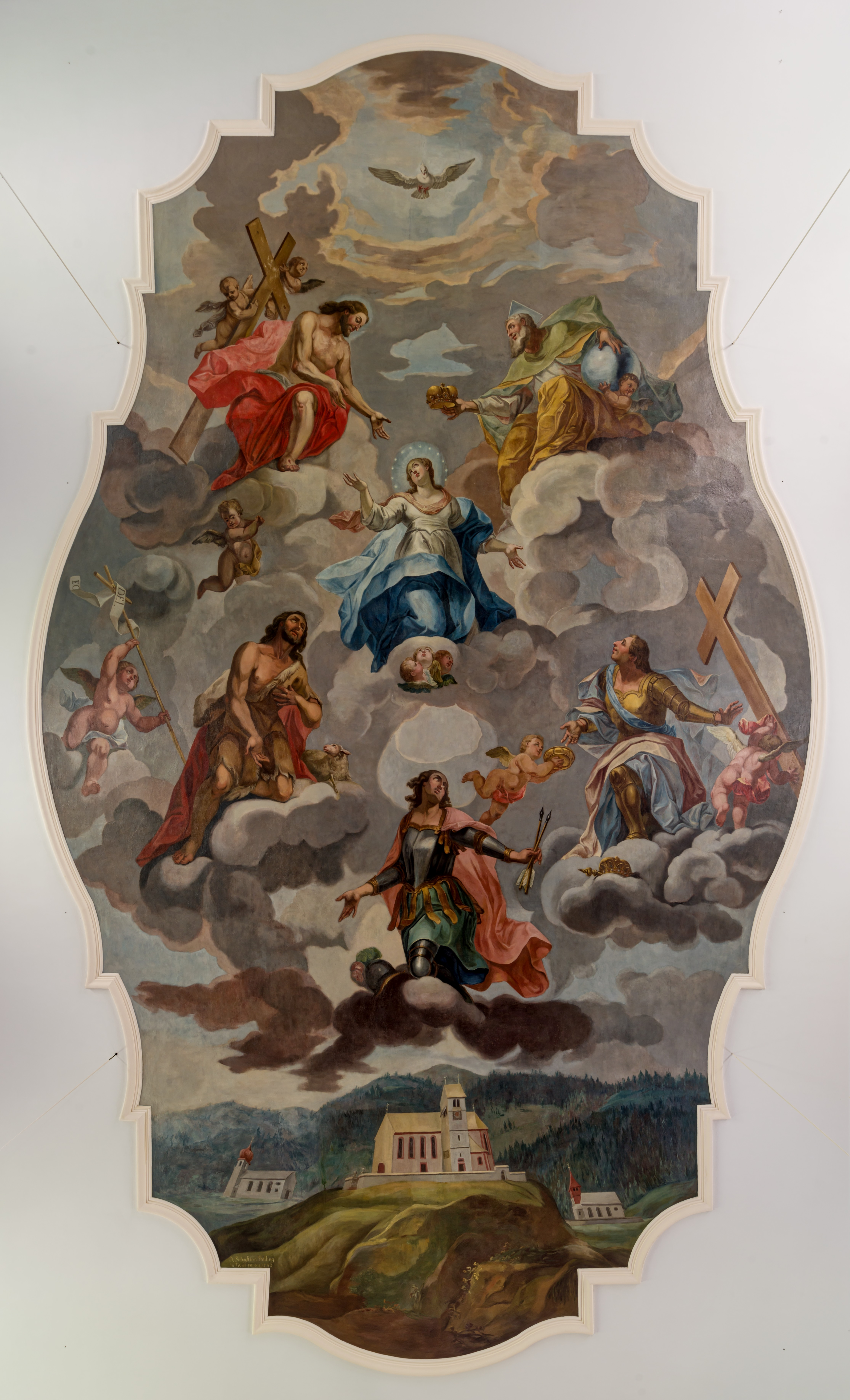 Bilder aus Oberried Deckengemälde im Kirchenschiff